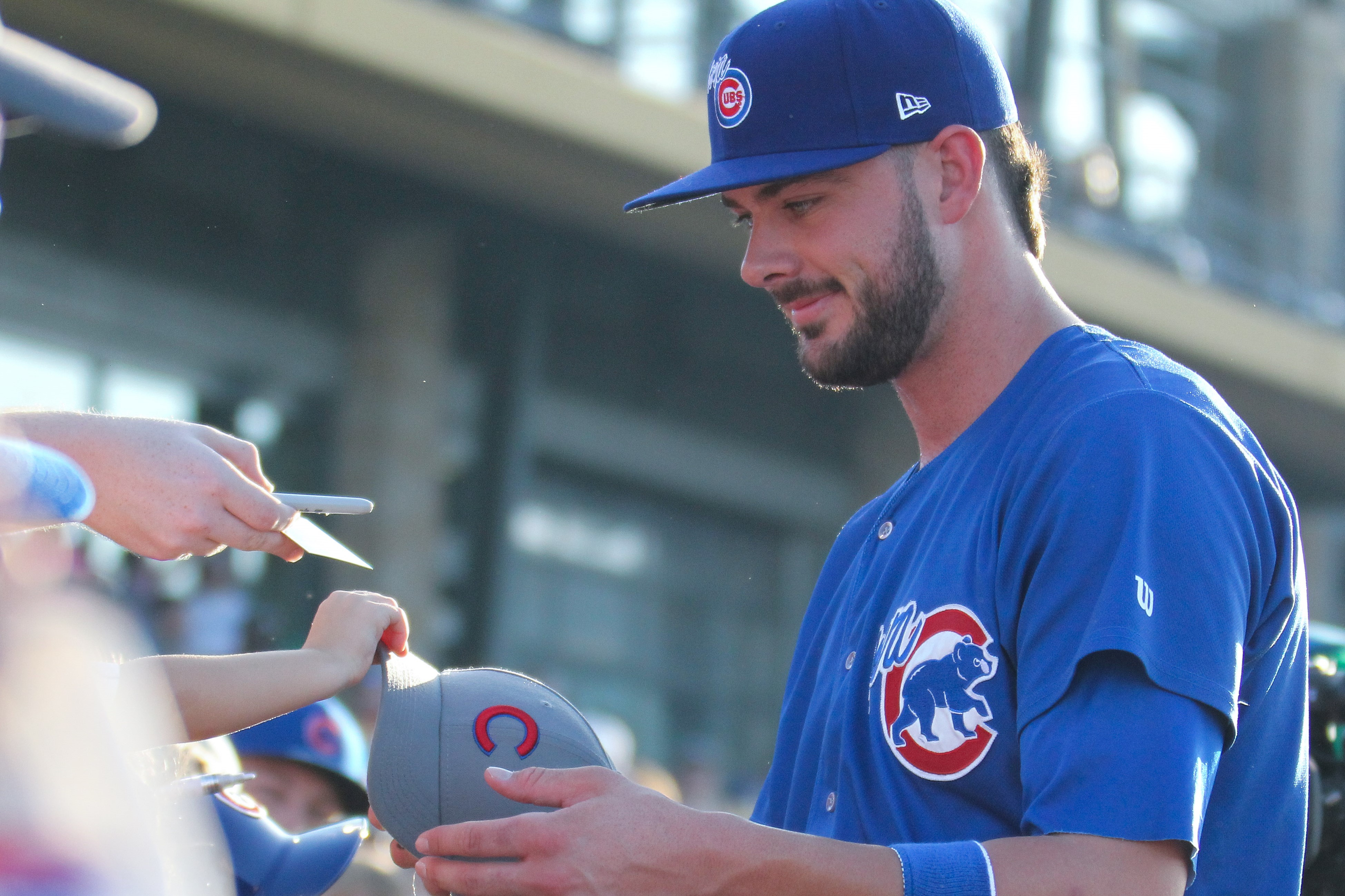 2018年に撮られたクリス・ブライアントの写真